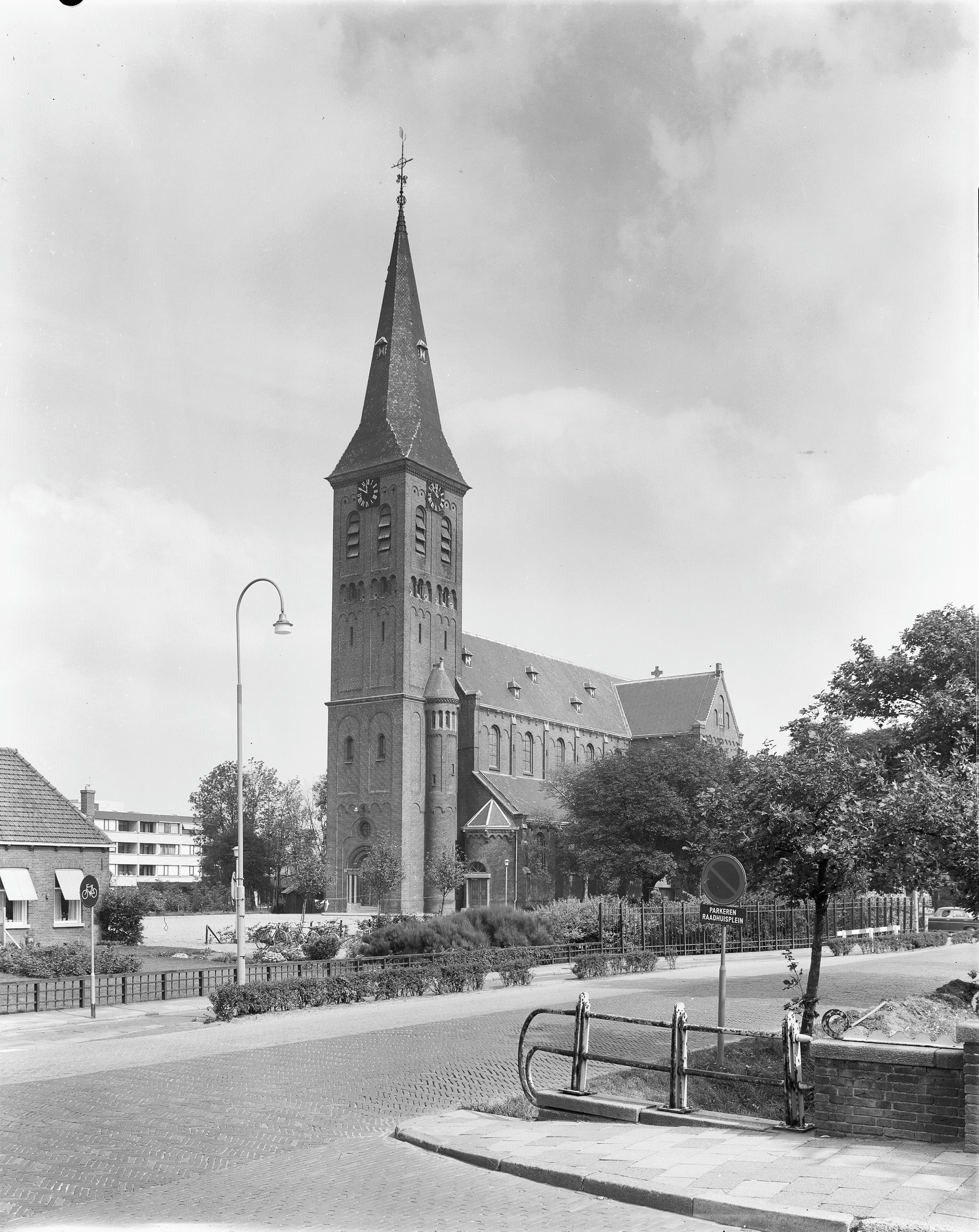 Rooms-Katholieke Kerk: exterieur